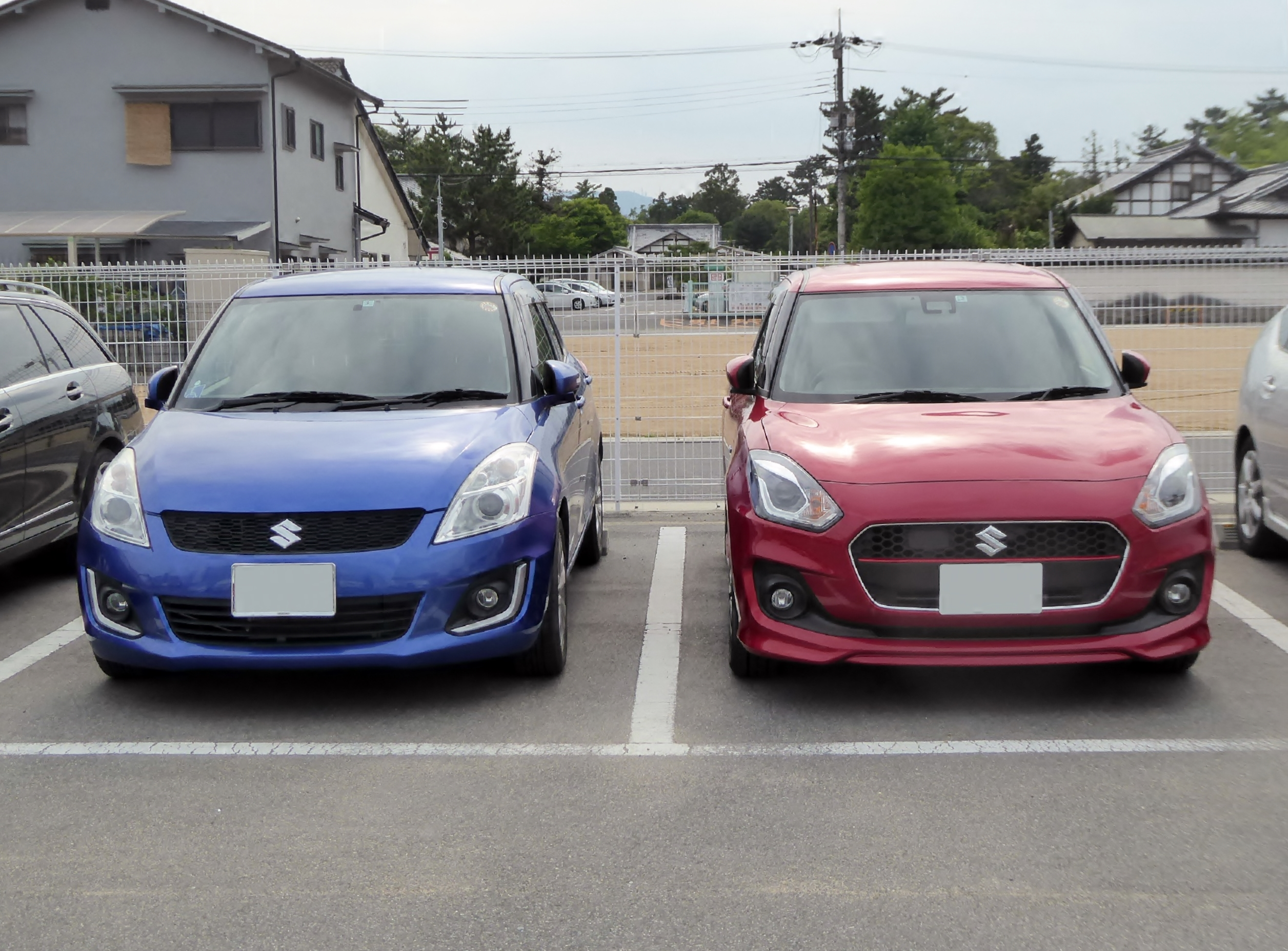 DBA-ZC72S型スズキ・スイフトXL及びDAA-ZC53S型スズキ・スイフトHYBRID RSをフロントから撮影。